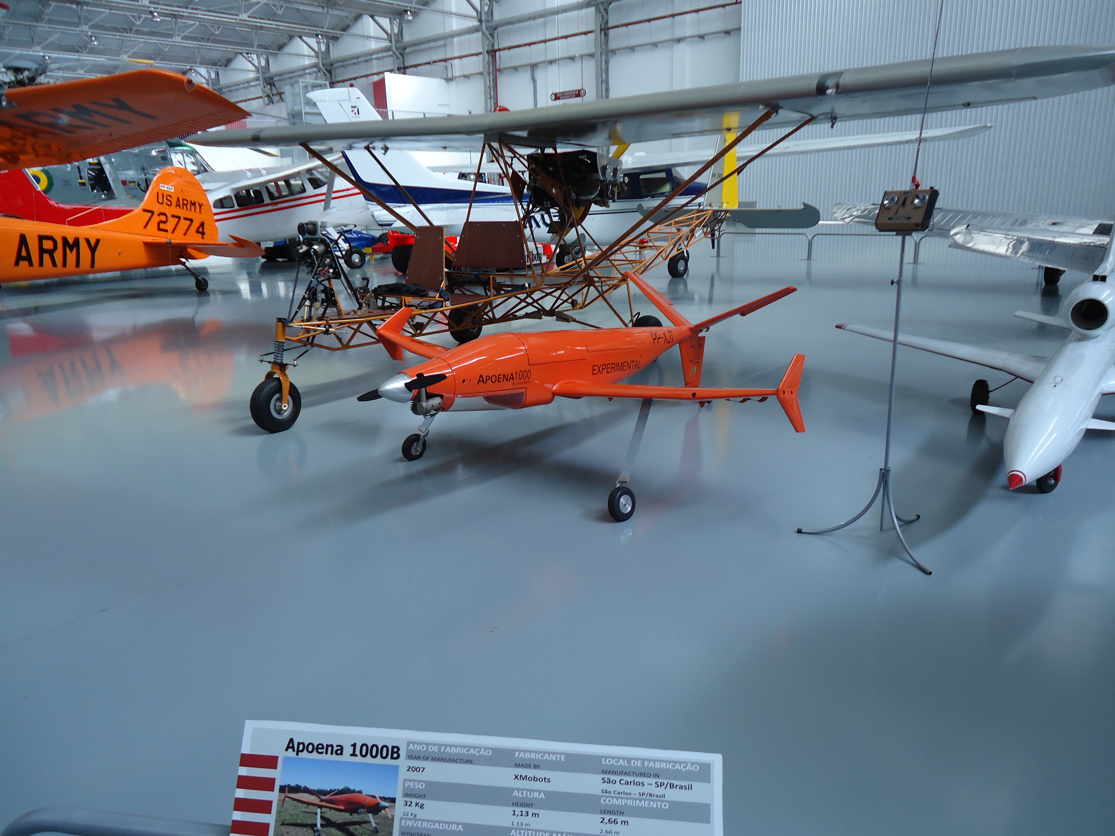 Drones expostos no museu TAM